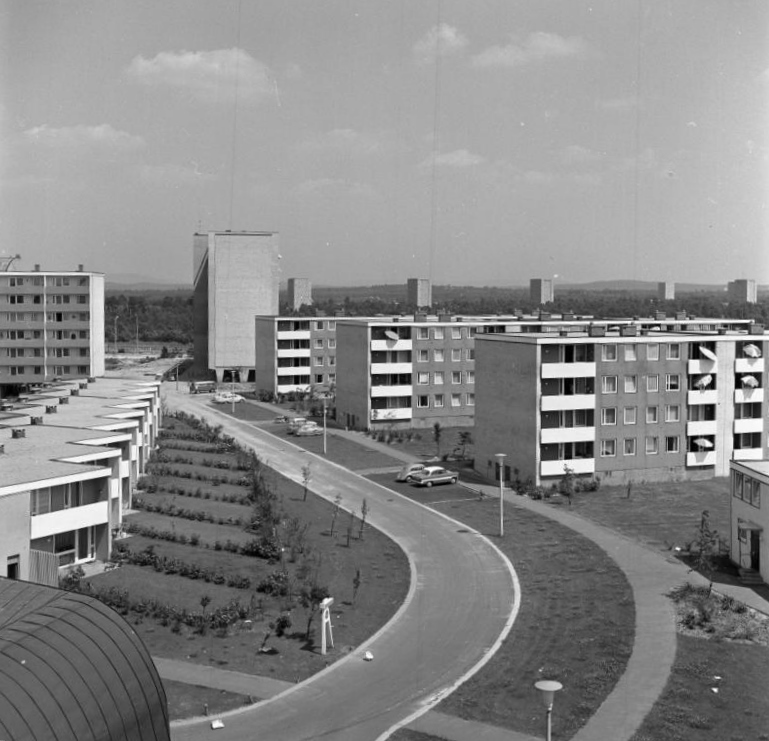 Wohnungsbau: Nürnberg-Zollhaus